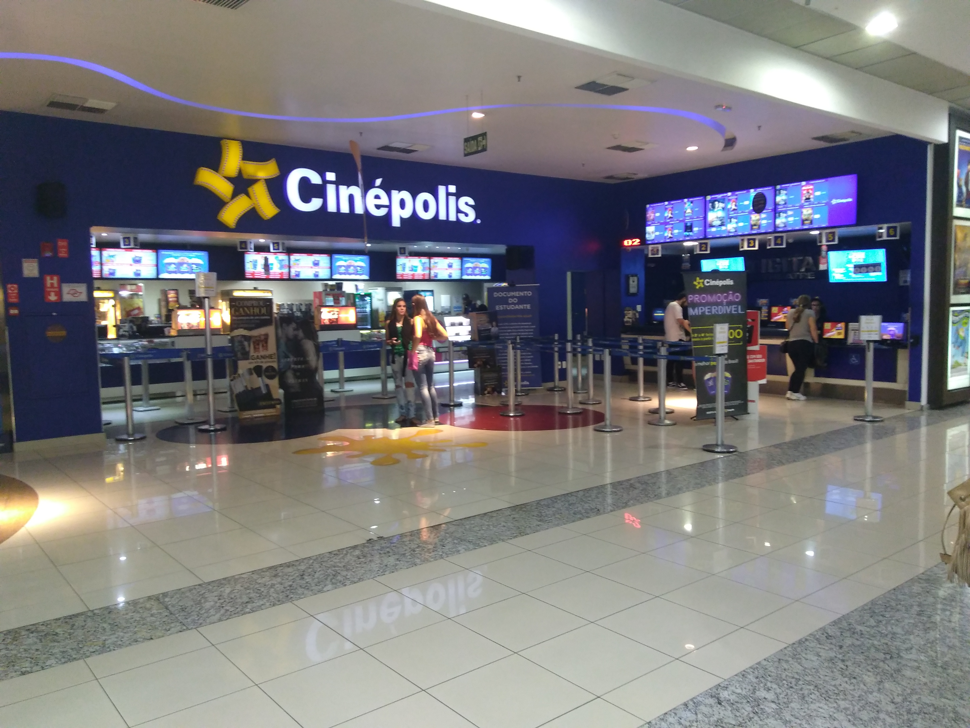 Vista da bilheteria do Cinépolis Mais Shopping de São Paulo, SP